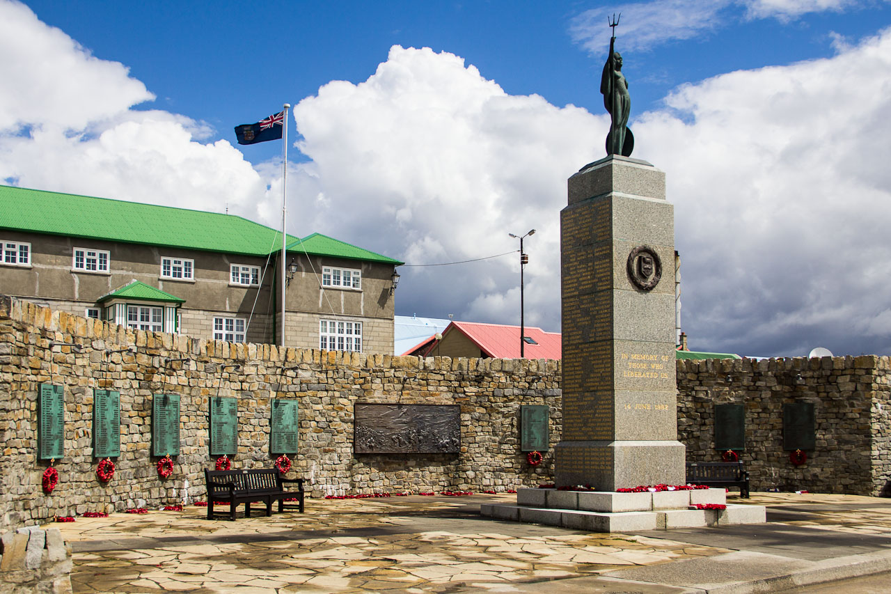 Falklands War Memorial, Stanley